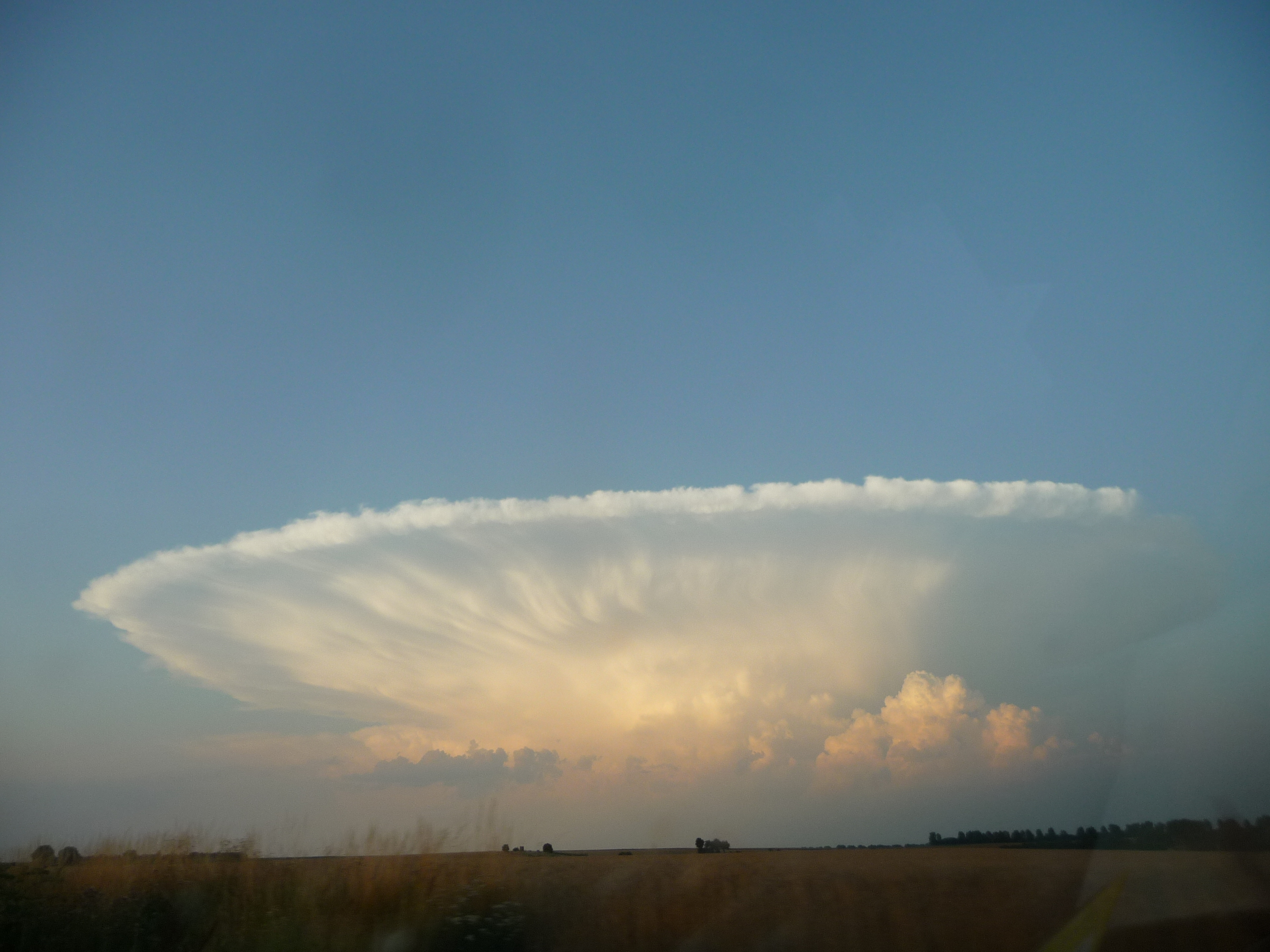 Aussergewöhnlich schöne Kumulonimbuswolke (auch Ambosswolke) über Jena im Abendlicht